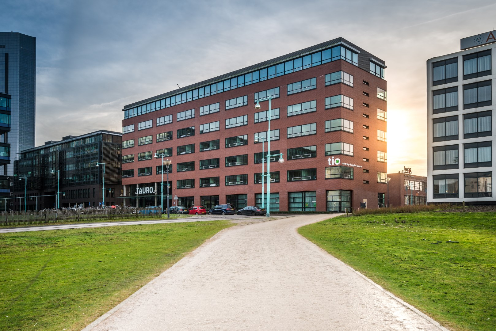 Hogeschool Tio Amsterdam Sloterdijk